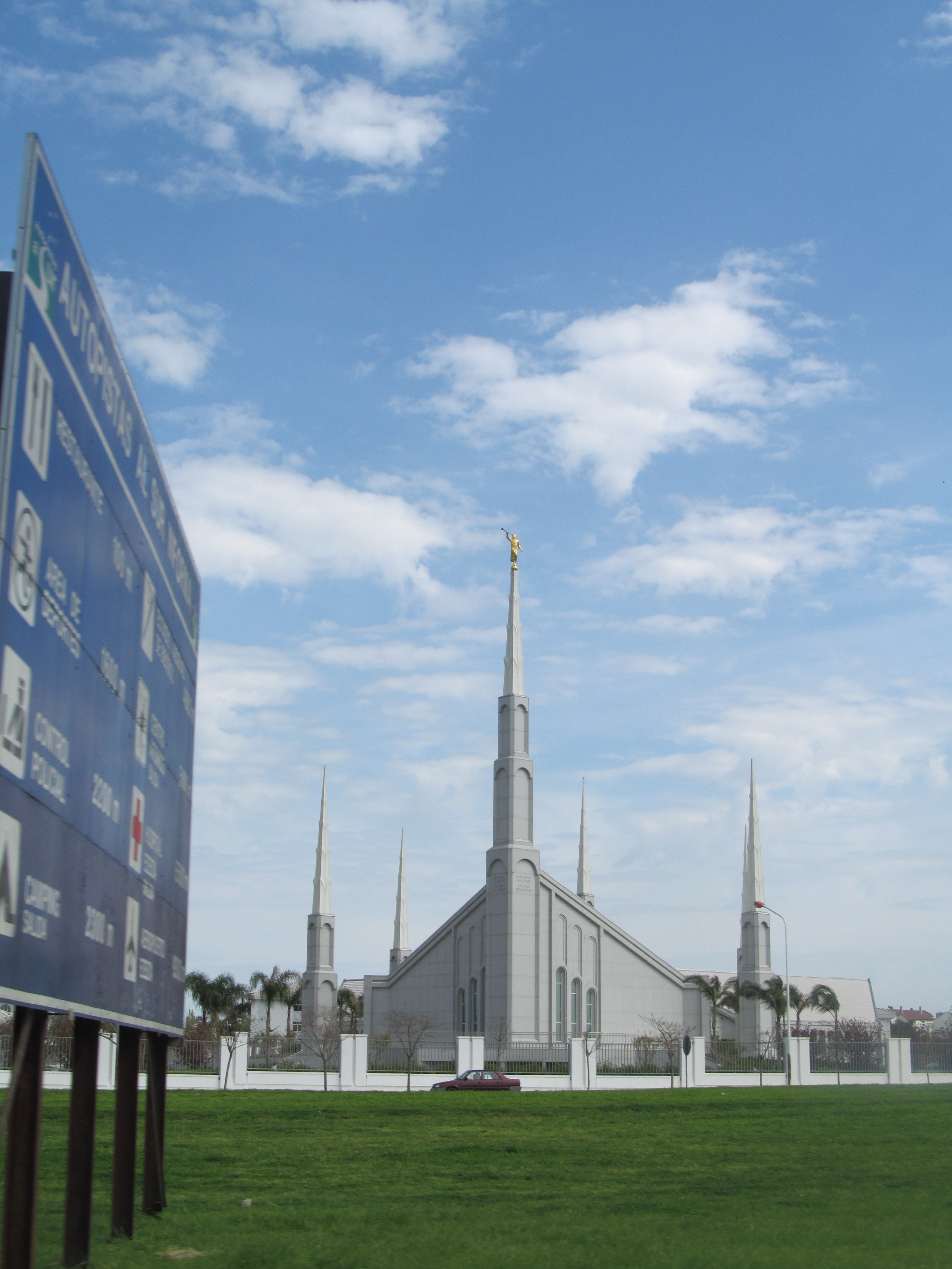 Vista de Ciudad Evita desde Autopista Ricchieri